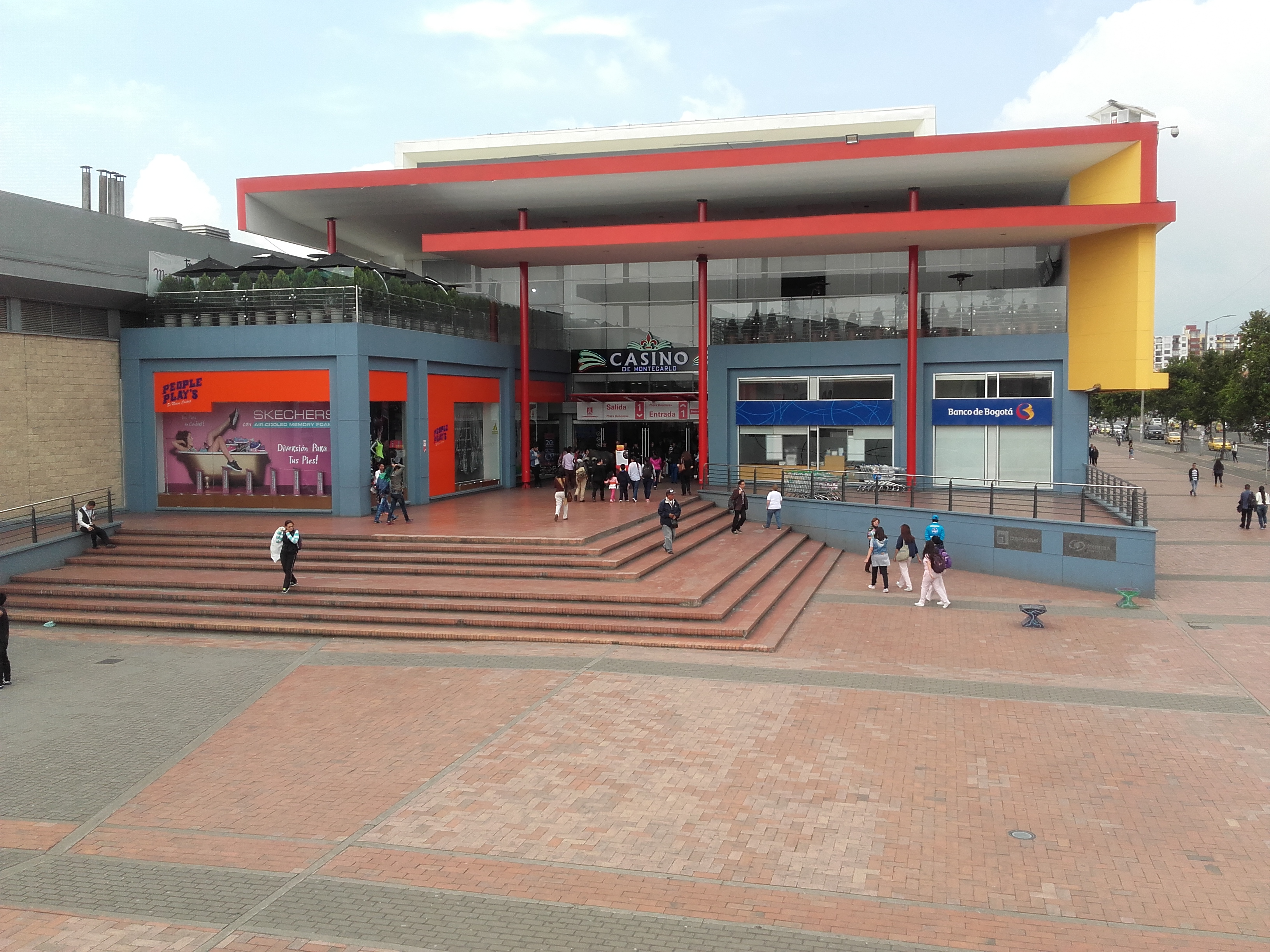 nemfmfmfmfn